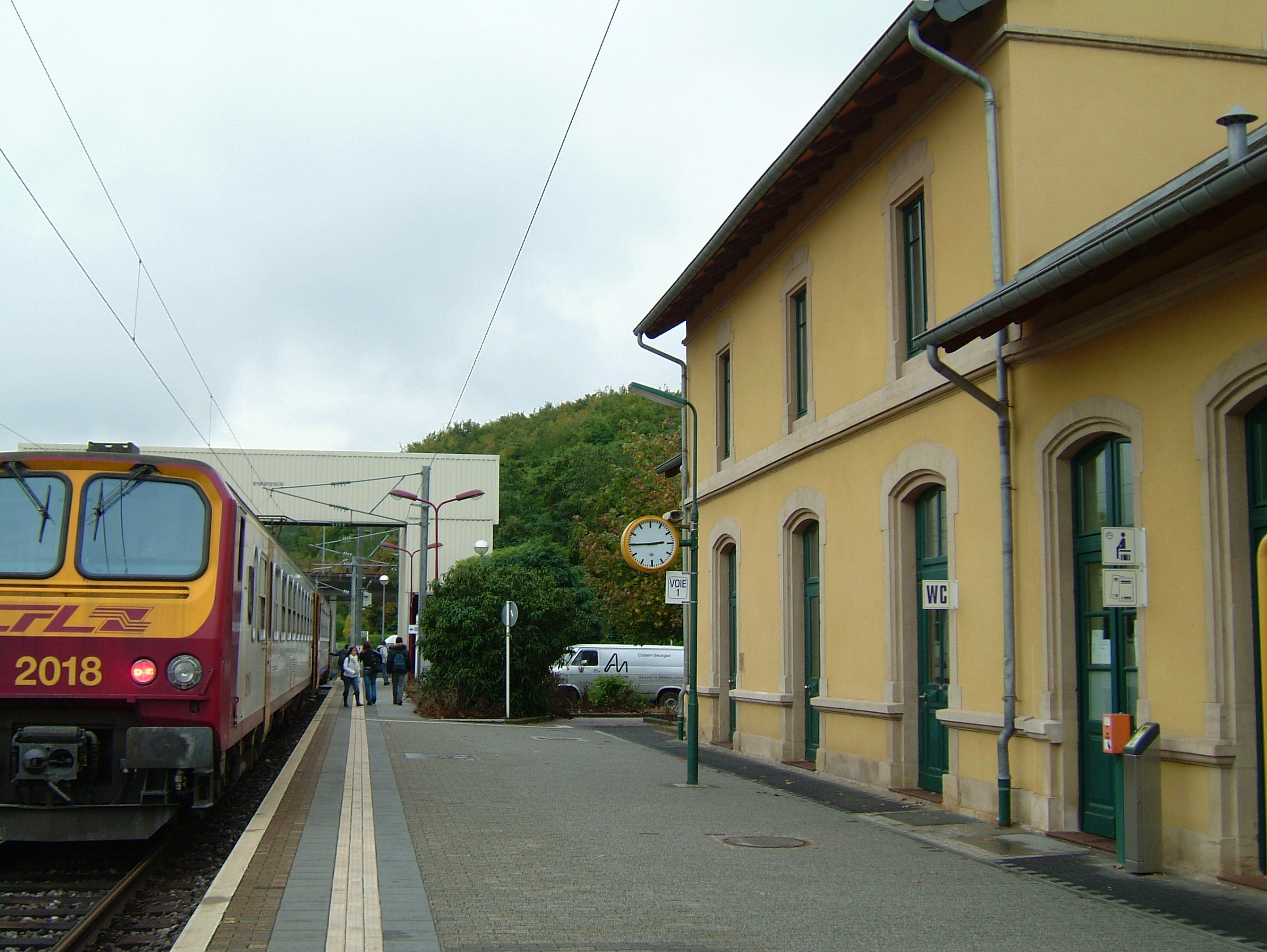 Gare Diddeleng - Schmelz .